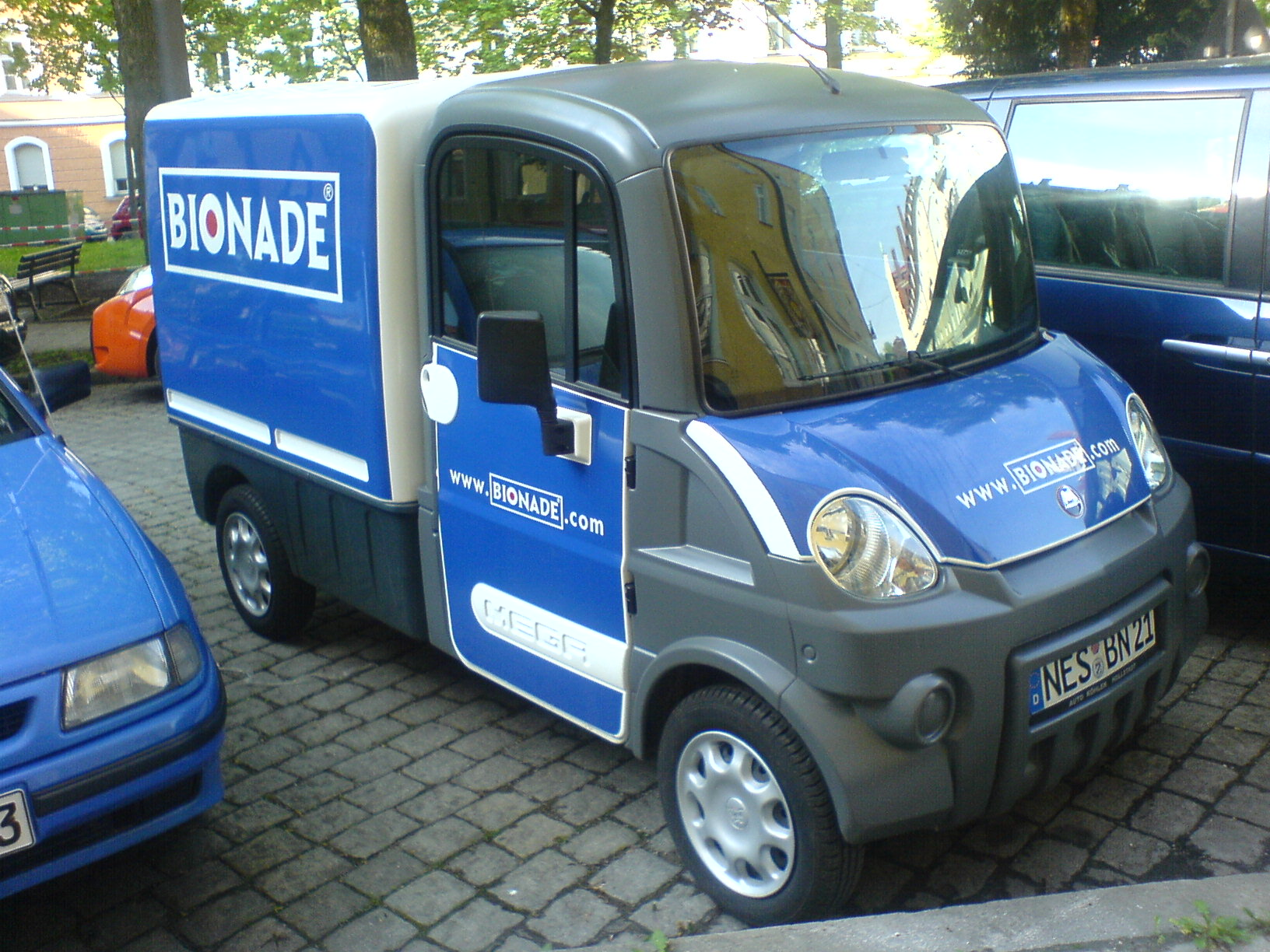 Iseki Mega